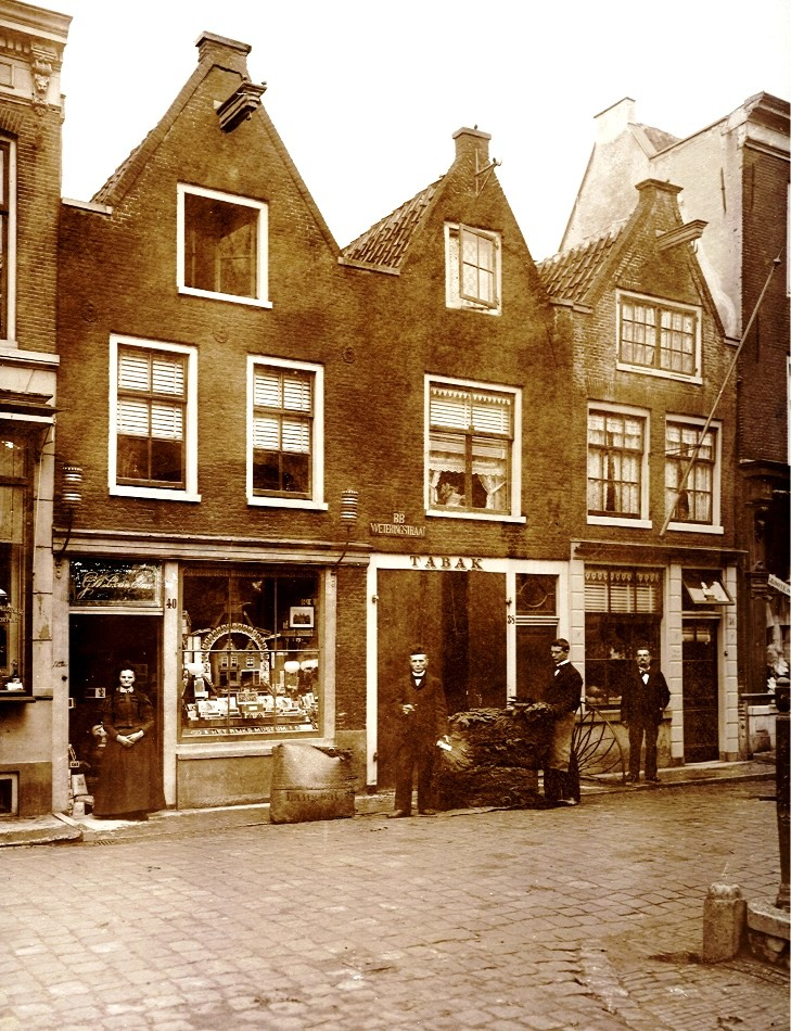 The tabacco factory "Het Wapen van Spanje" anno 1893 on Weteringstraat 40 Amsterdam in 1893 From left to right: Henriette van Vulpen (Grootje) born 1818 - her son Jantje Pietje Zwier - her grandson Hendrik Zwier - her son (father of Hendrik) Nicolaas